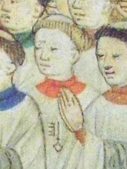 Raoul Roussel, chanoine et trésorier, futur archevêque de Rouen, dans une enluminure du compte de la débite.